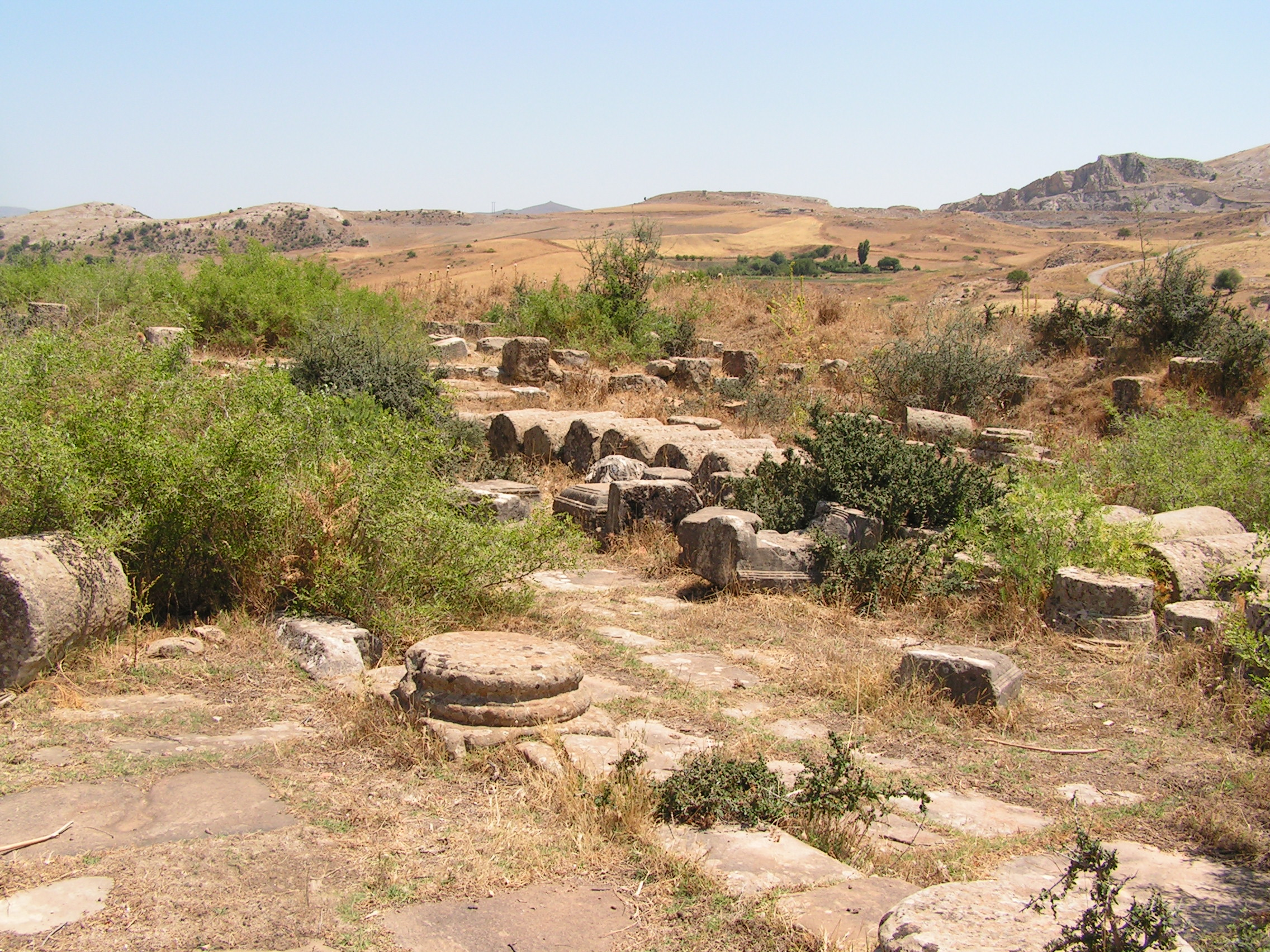 Ansicht Announa